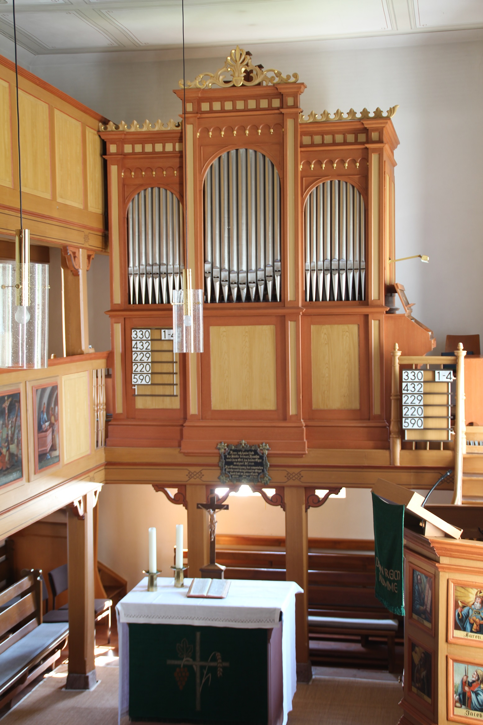 Orgel der Evangelischen Kirche Burkhardsfelden, Gemeinde Reiskirchen, Landkreis Gießen, Hessen, Deutschland